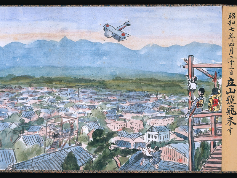 昭和１３年富山市作成の『富山市五十年史絵巻』所収の立山号飛来図。富山県立図書館古地図・貴重書ギャラリーより引用。